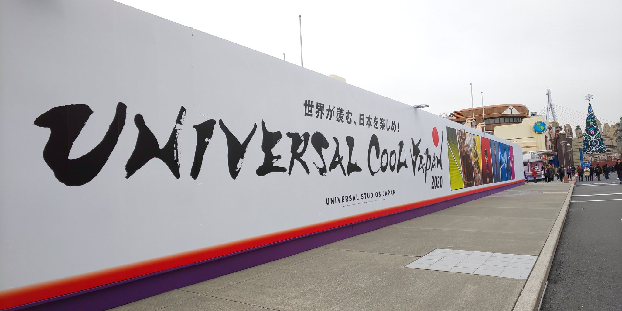 UNIVERSAL COOL JAPAN